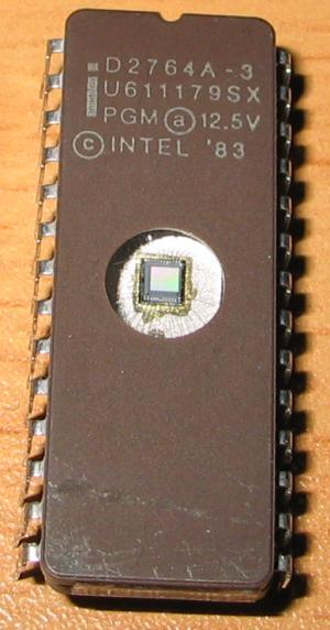 EPROM Speicherinhalt: 64 Kilobit Benötigte Spannung zum Programmieren: 12,5 V Hersteller: Intel Baujahr: 1983